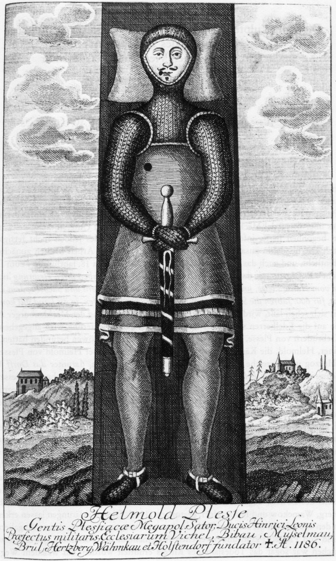 Stich einer in der Kirche Hohen Viecheln befindlichen Holzskulptur, die Helmold von Plessen zeigen soll. Bildunterschrift: Helmold Plesse / Gentis Plessiacae Megapol. Sator, Ducis Hinrici Leonis / Praefectus militaris, Ecclesiarum Vichel, Bibau, Müsselmau, / Brül, Hertzberg, Wähmkau et Holstendorf fundator. † A. 1186